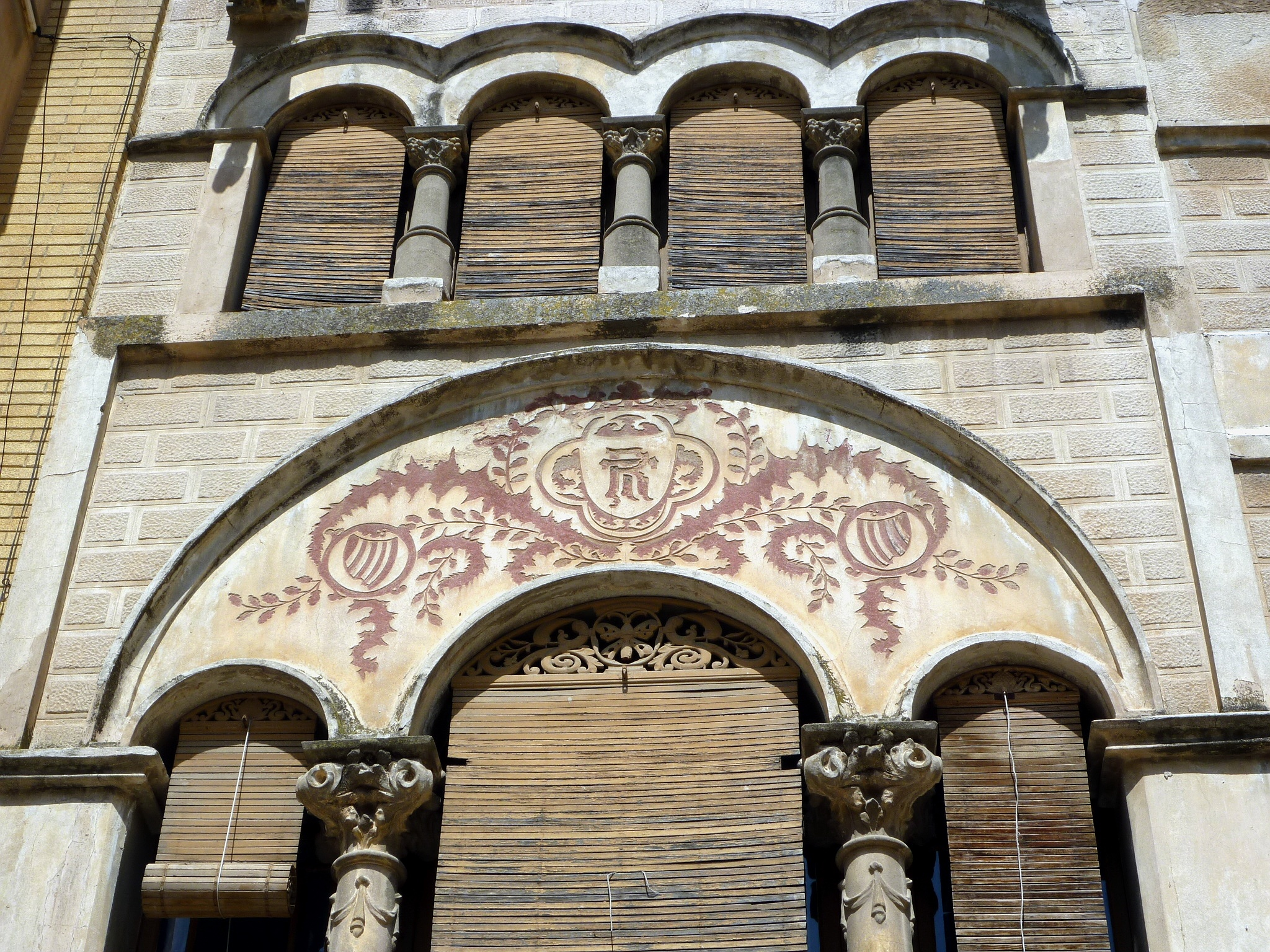 Cal Trilla (Torà): detall de la façana.